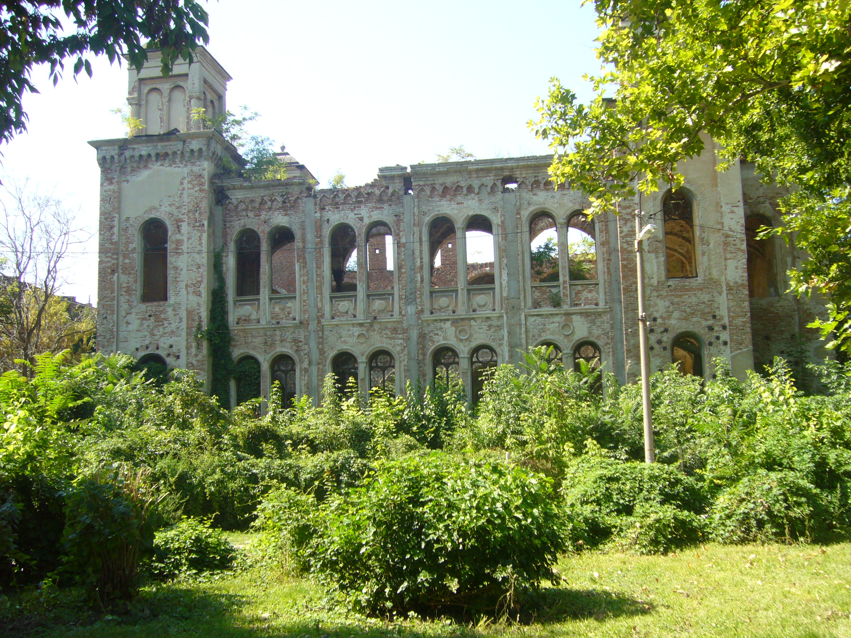 son las ruinas de la sinegoga de vidin